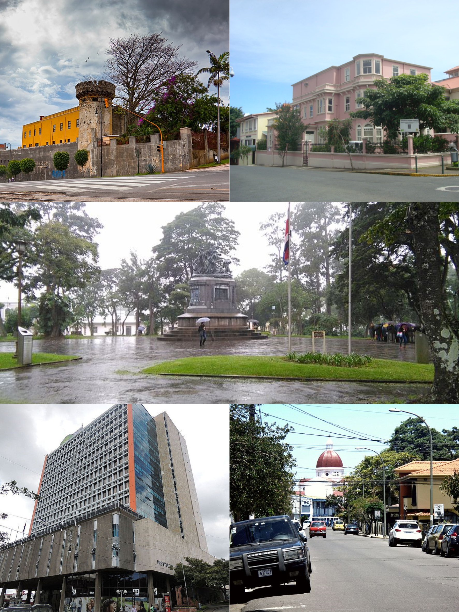 Fotomontaje del distrito de El Carmen, ciudad de San José